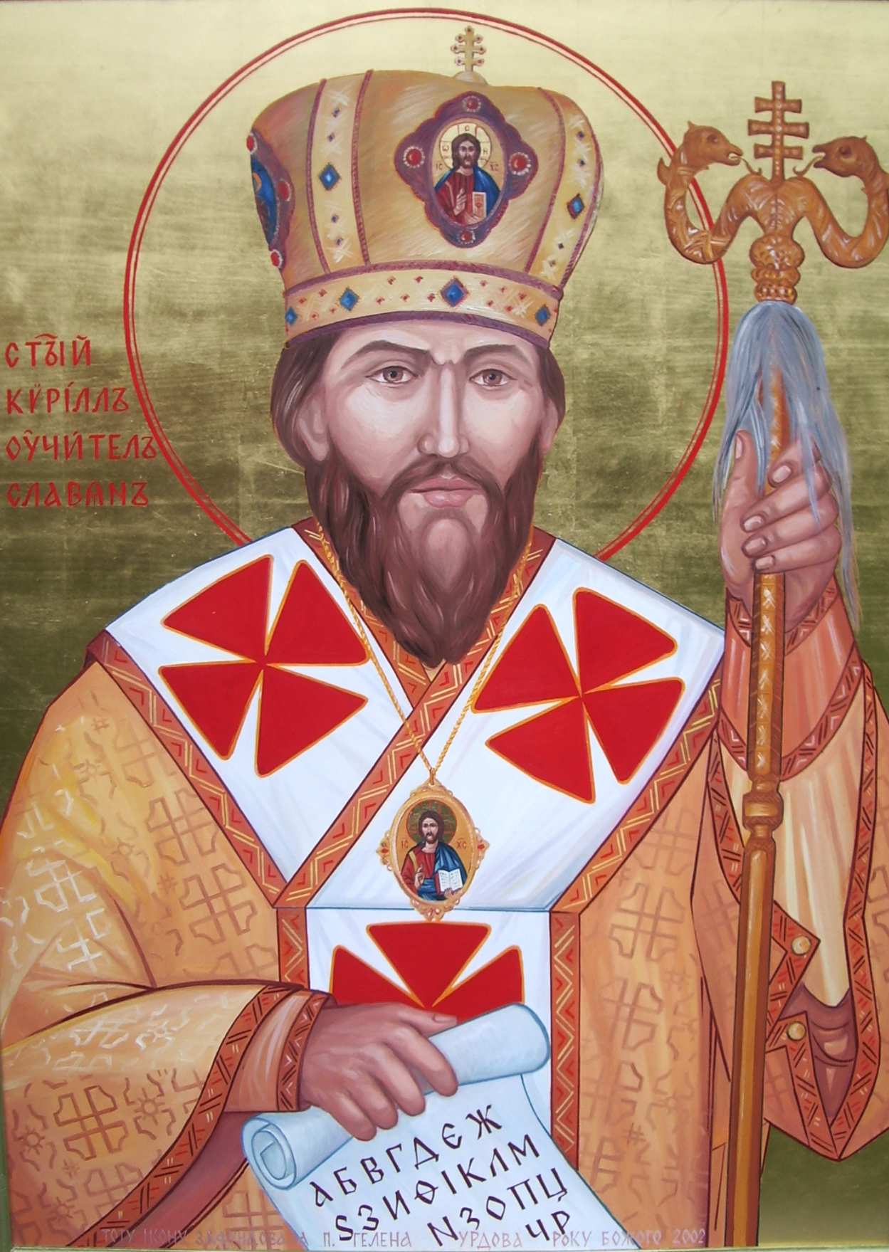 Cyril Konštantín, baziliánsky monastier v Prešove, Slovensko. Photo taken by Jozafát Vladimír Timkovič, OSBM